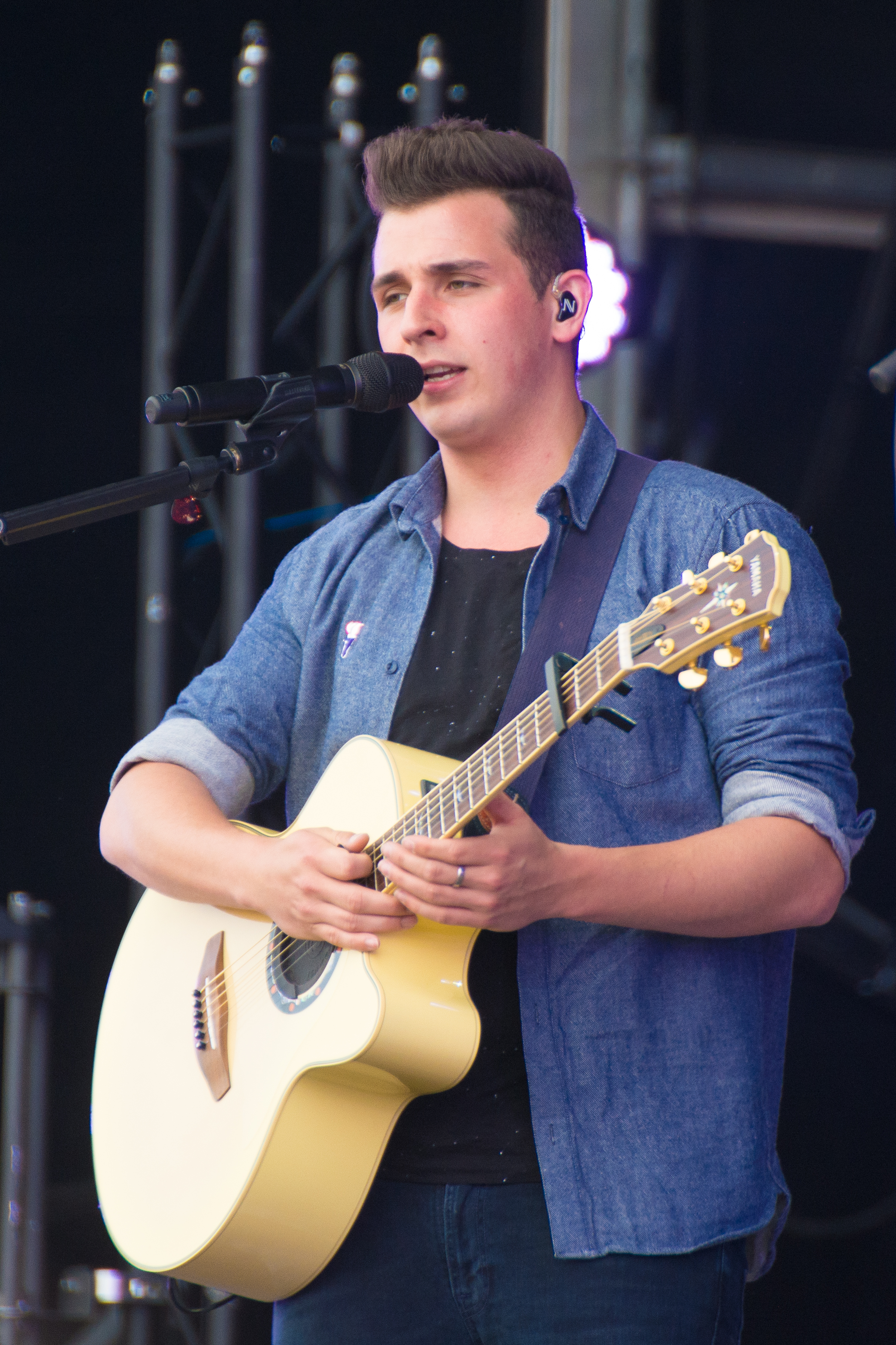 Nielson tijdens het Bevrijdingsfestival op 5 mei 2014 te Zwolle